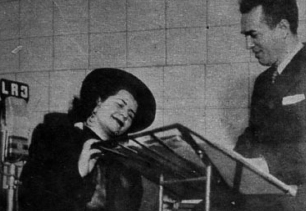 RAYEN QUITRAL EN B. AIRES. He Aquí una foto enviada exclusivamente a revista "Ecran" y en la cual vemos a la cantante chilena ensayando con el maestro Balaguer, minutos antes de iniciar una de esas audiciones suyas que la han hecho famosa ante los públicos argentinos.